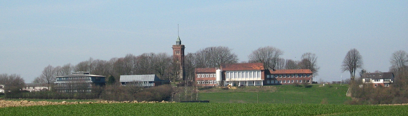 Bismarckturm mit Jugendbegegnungsstätte von Süden aus aufgenommen